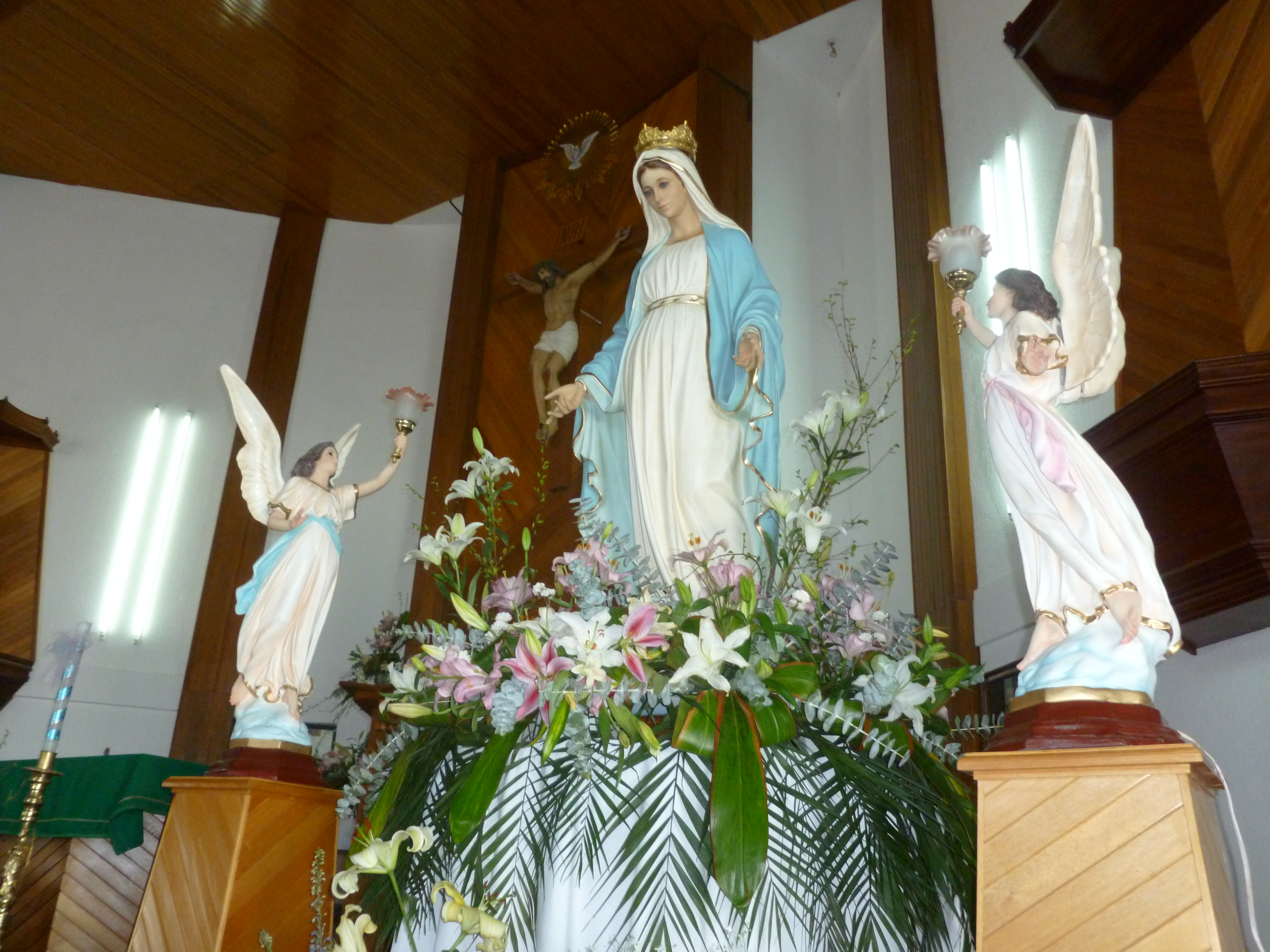 Imagen con motivo de la fiesta patronal 2012 con la Imagen de Santa María Reina de la Paz coronada.